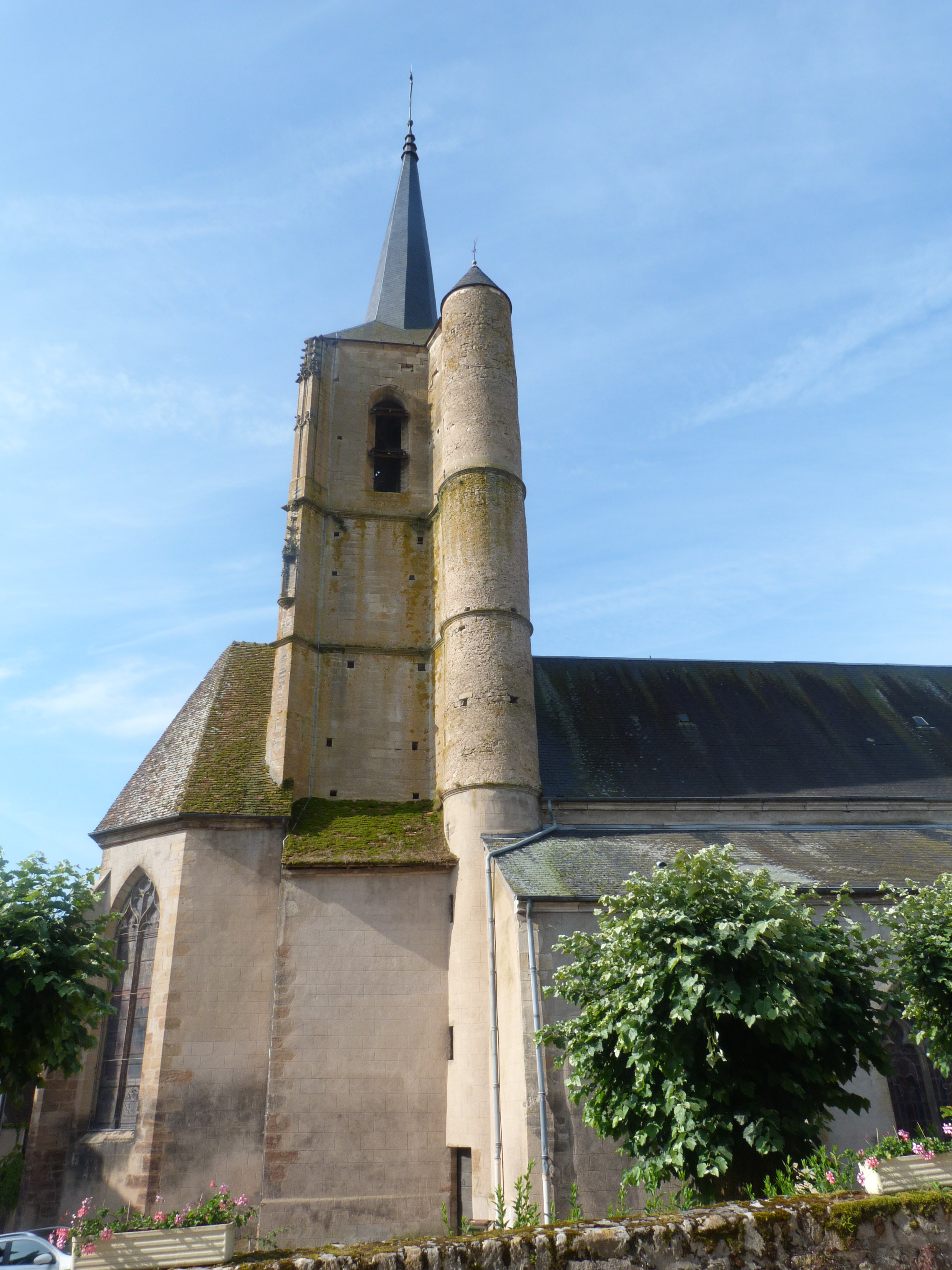 Preĝejo de Moulins-Engilbert